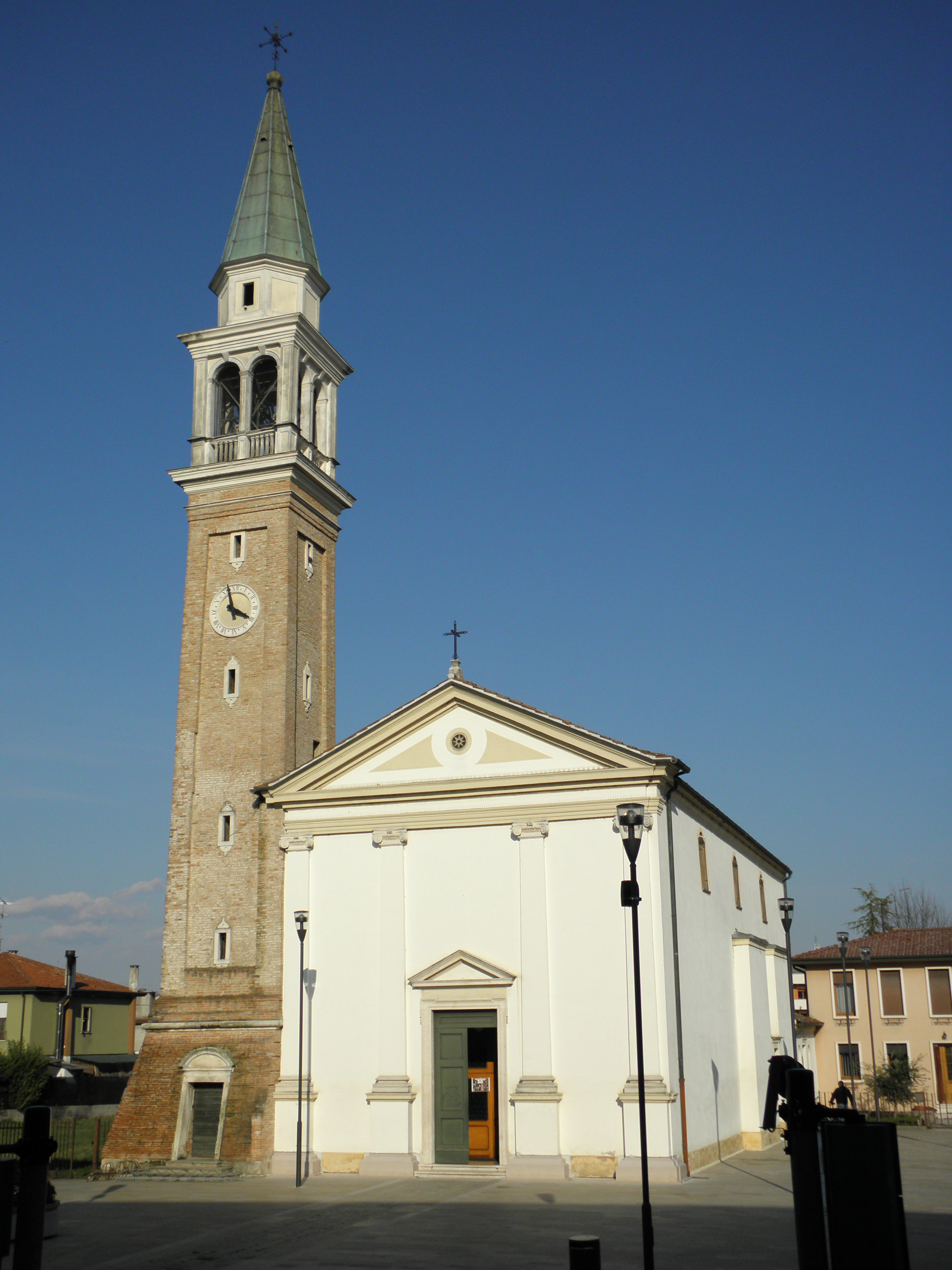 San Pietro, frazione di Stra: la chiesa parrocchiale di San Pietro apostolo.